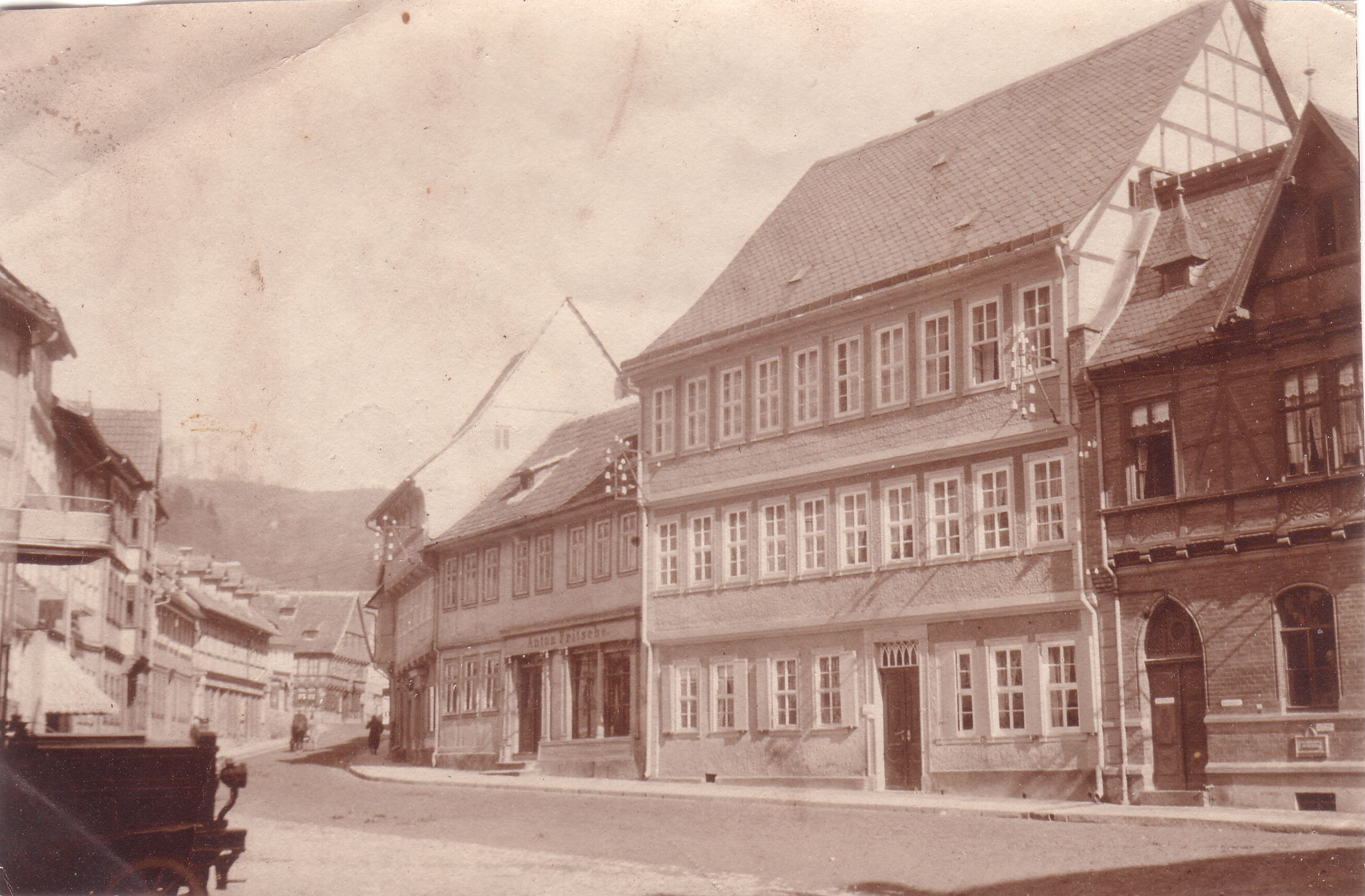 Am Markt, Stolberg, Germany